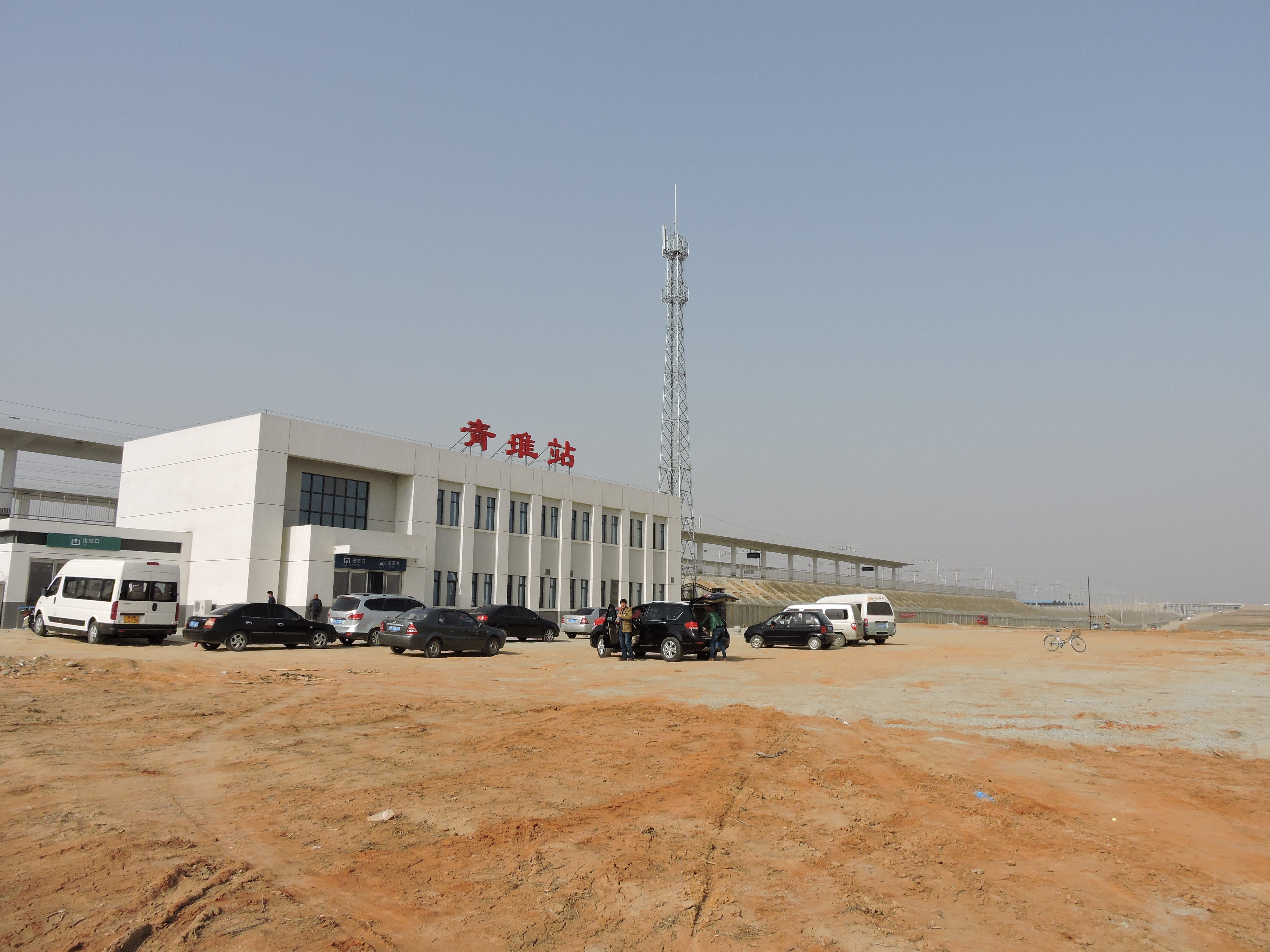 青堆站